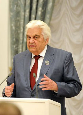 Евгений Павлович Кралатов